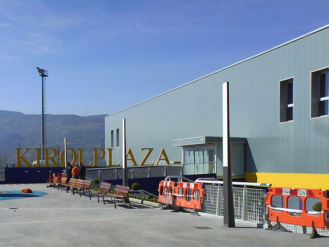 kabiezeseko kirol plaza, santurtziko polikiroldegia / Polideportivo de Kabiezes y Kirol Plaza, Santurtzi